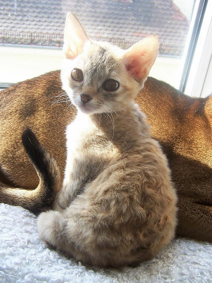 german rex